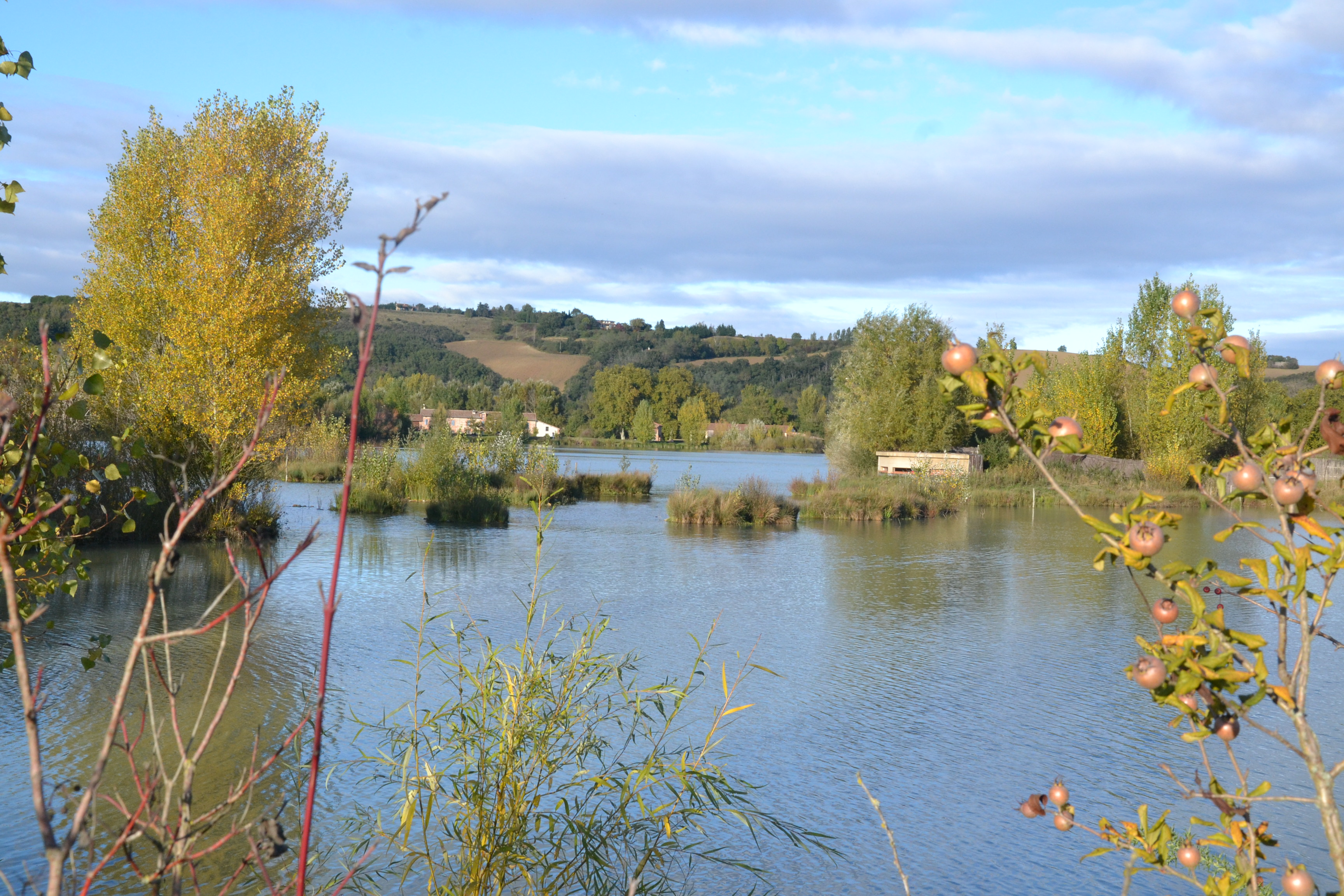 Paysage du Domaine des Oiseaux, Mazères (Ariège, France).